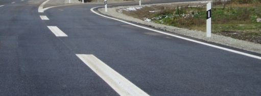 Markierung